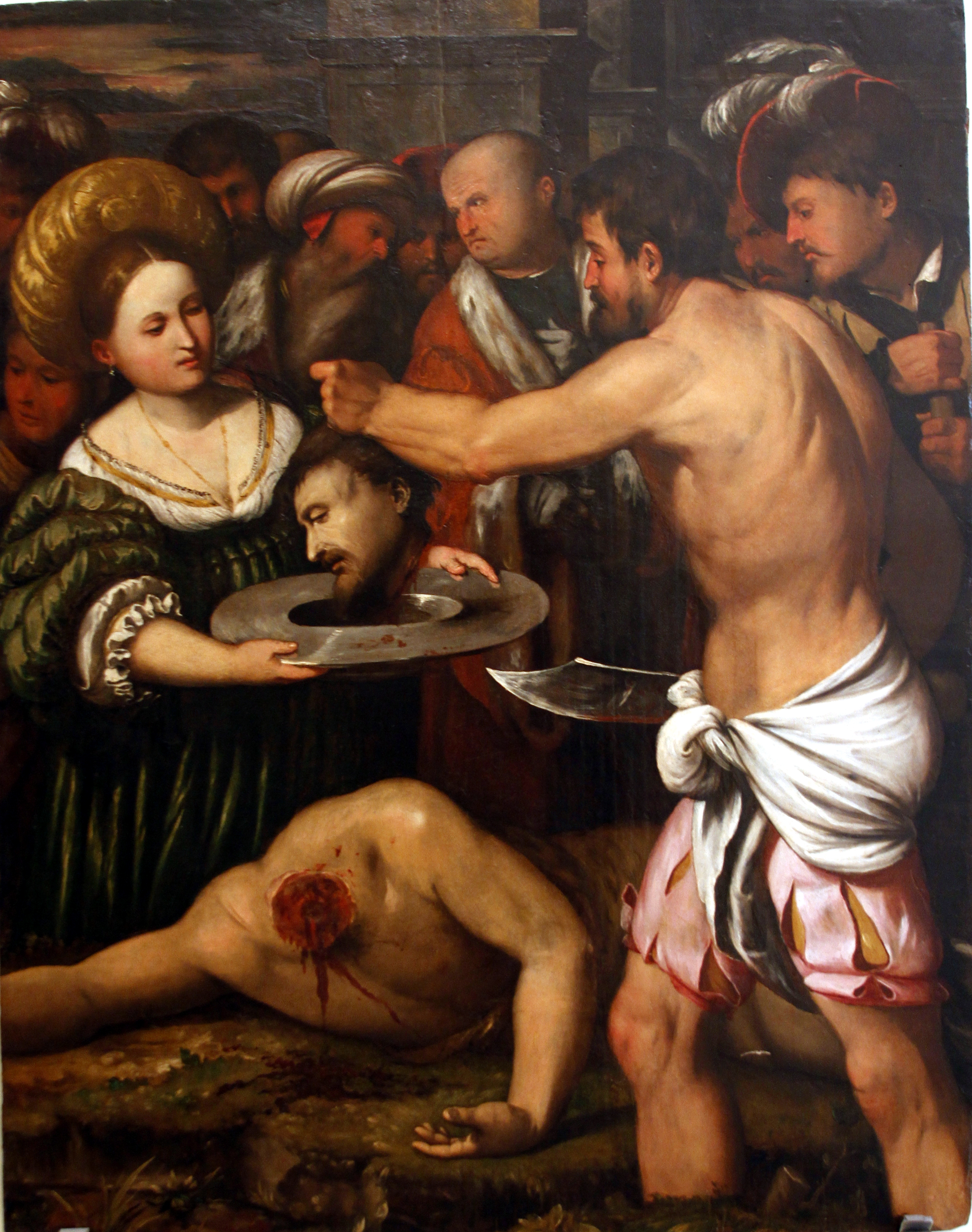 Beheading of St. John the Baptist by Callisto Piazza da Lodi